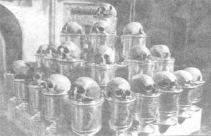 Мироточивые черепа святых угодников в Киево-Печерской Лавре. Киев, 1937 г.